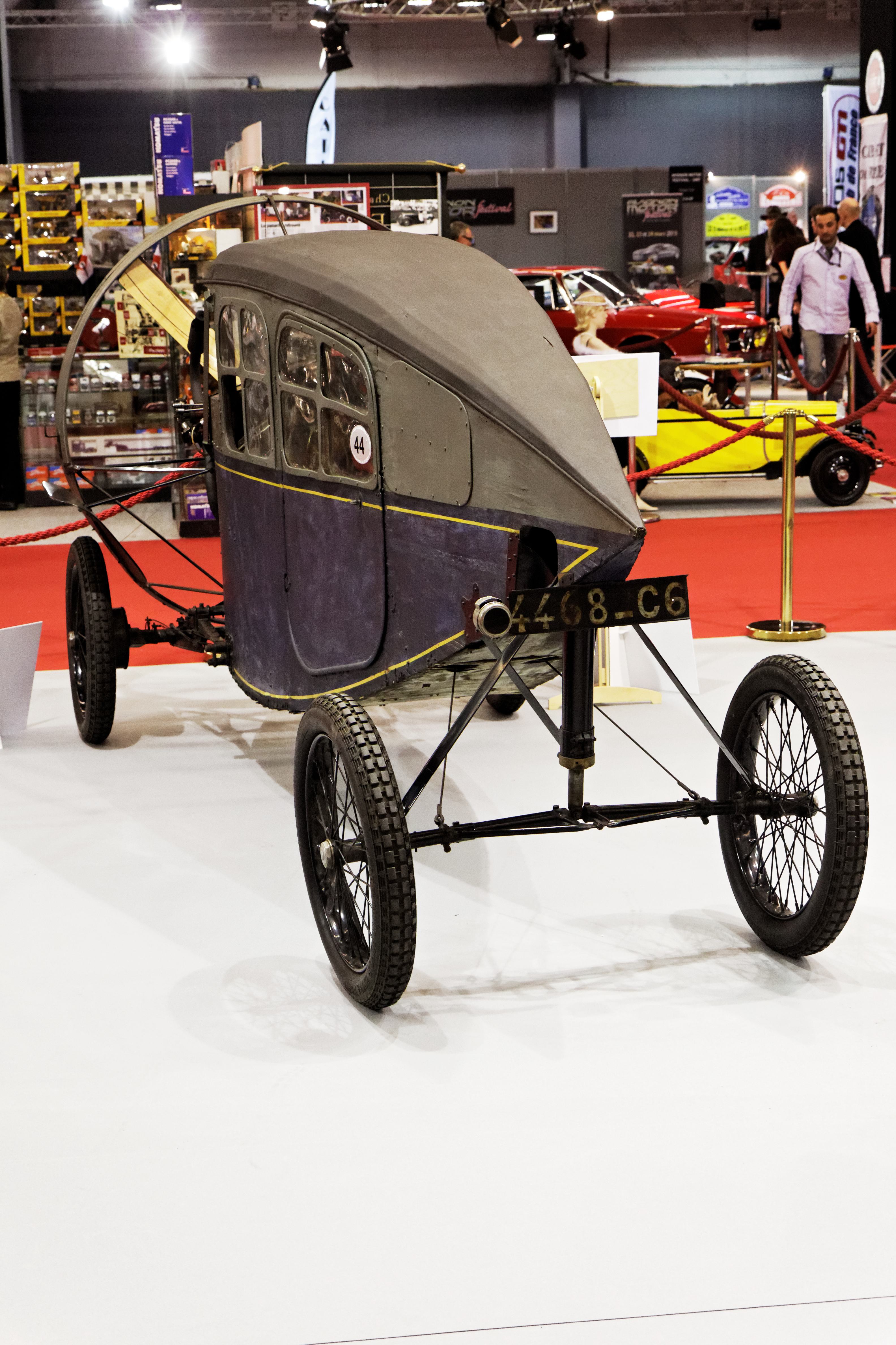 Une voiture à hélice Leyat conduite intérieure présentée lors du salon Retromobile 2013.